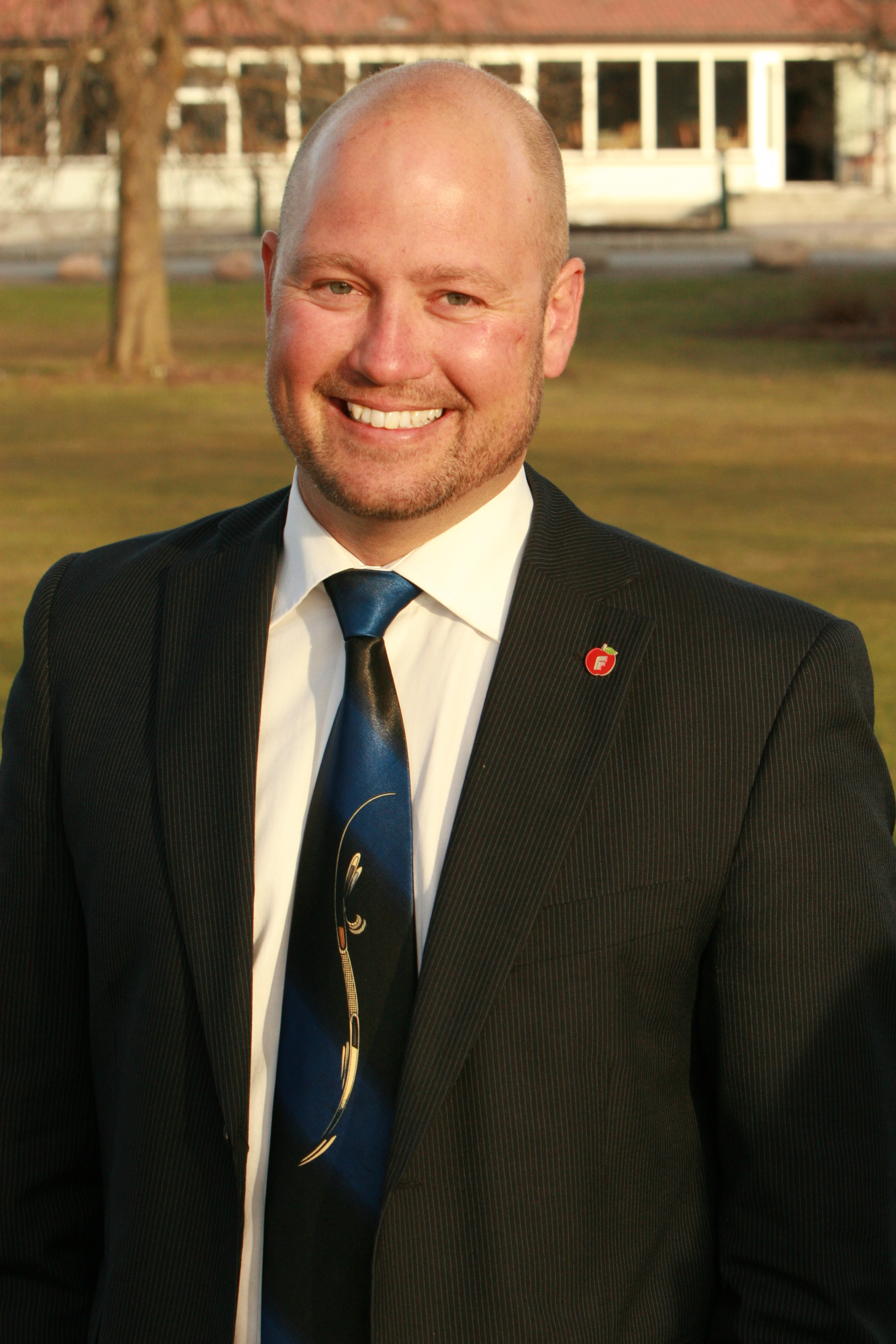 Anders Anundsen, FrP-politiker